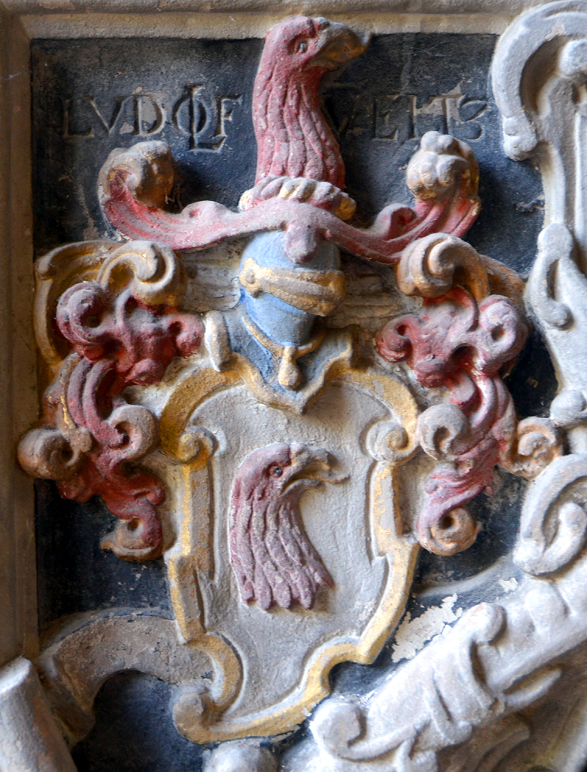 Koloriertes Wappen des niedersächsischen Adelsgeschlechtes von Eltz am Grabmal des Burgwedeler Hauptmanns und Amtsvogts Ludolf von Eltz (vor 1590–1626) in der St. Petri-Kirche in Burgwedel